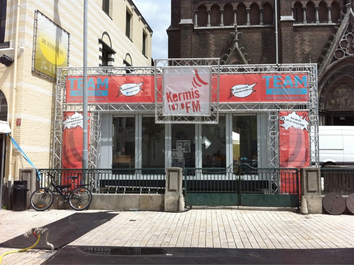 Kermis FM studio in 2010